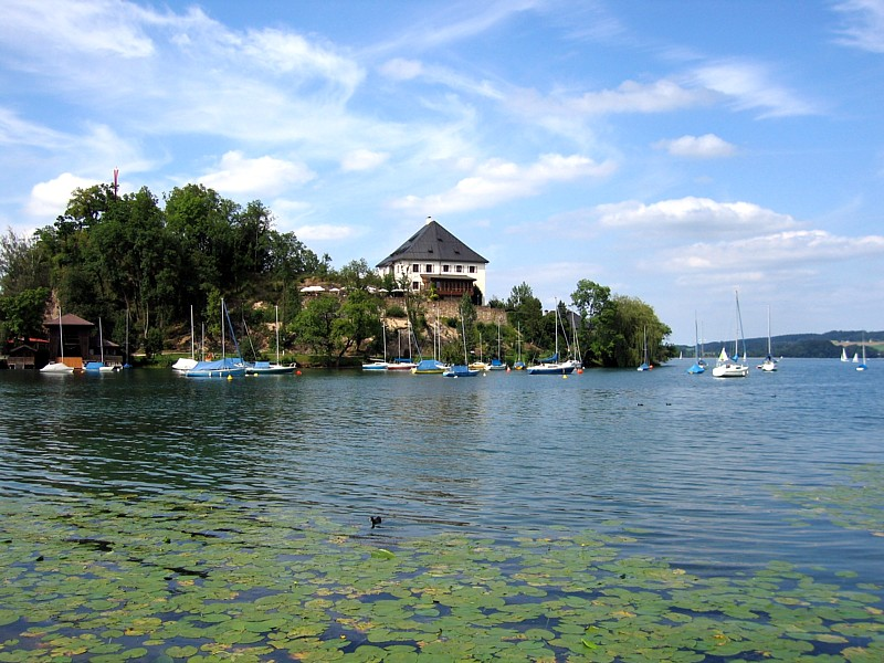 Schloss Mattsee - Bundesland Salzburg - Österreich